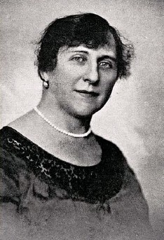 Marie Janků-Sandtnerová, česká učitelka, autorka kuchařských příruček a propagátorka zdravé výživy